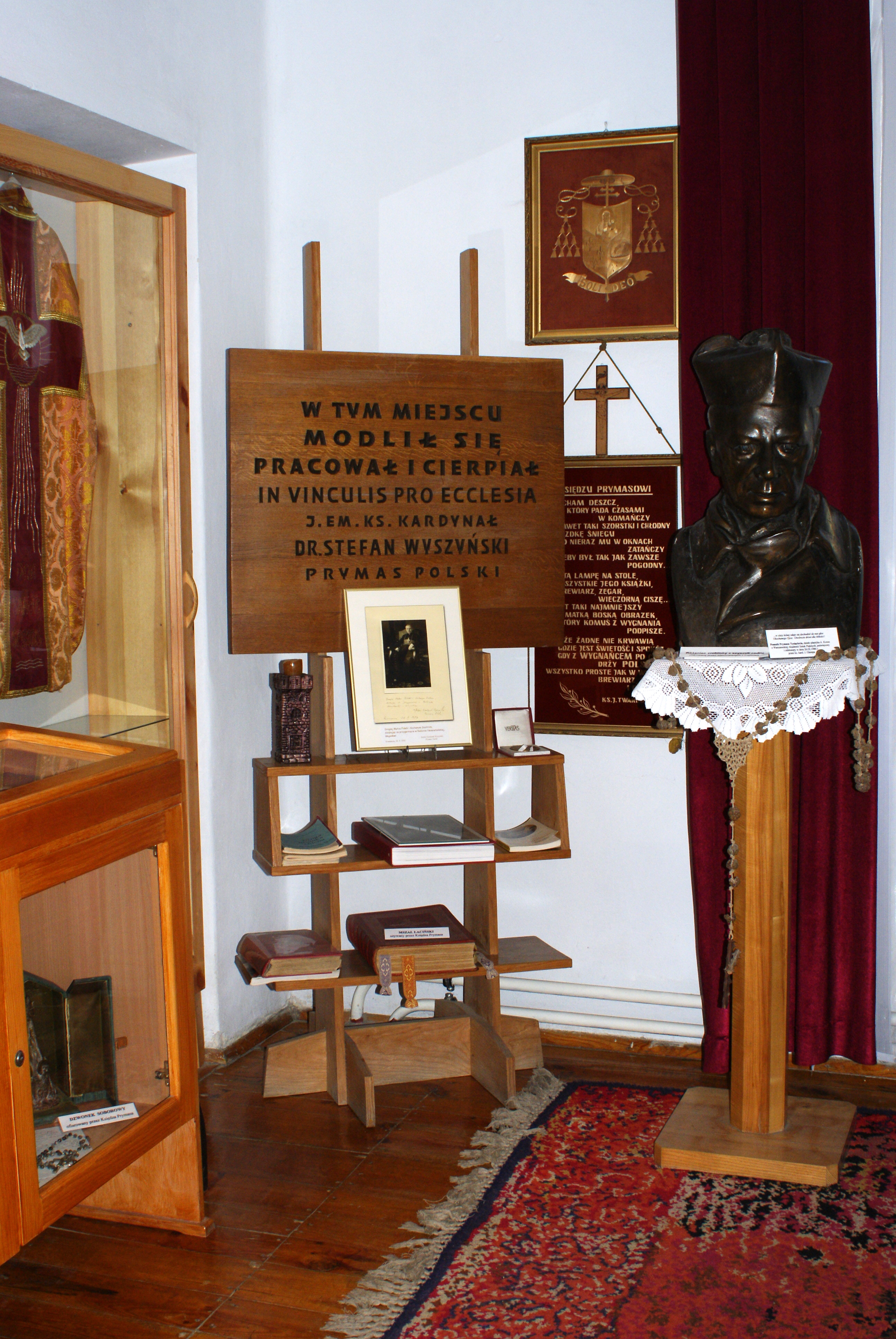 klasztor nazaretanek, pomieszczenie gdzie przebywał Prymas Tysiąclecia Komańcza, Komańcza 09.2007.